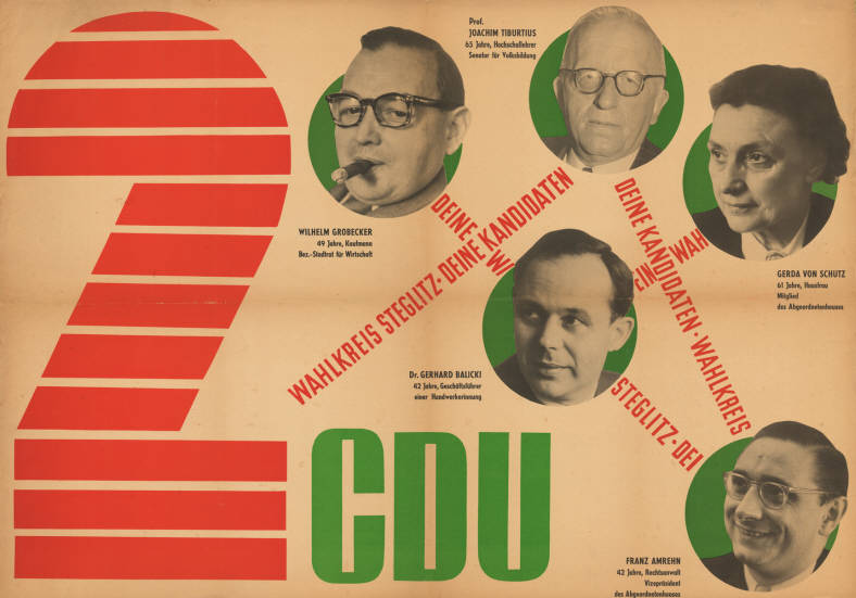 2 Wahlkreis Steglitz - Deine Kandidaten Wilhelm Grobecker, Joachim Tiburtius, Gerda von Schütz, Gerhard Balicki, Franz Amrehn CDU Abbildung: Porträtfotos Kommentar: mit Altersangabe und Kurzbiografie Plakatart: Kandidaten-/Personenplakat mit Porträt Objekt-Signatur: 10-004 : 159 Bestand: Plakate zu Abgeordnetenhauswahlen Berlin (10-004) GliederungBestand10-18: Plakate zu Abgeordnetenhauswahlen Berlin (10-004) » CDU Lizenz: KAS/ACDP 10-004 : 159 CC-BY-SA 3.0 DE